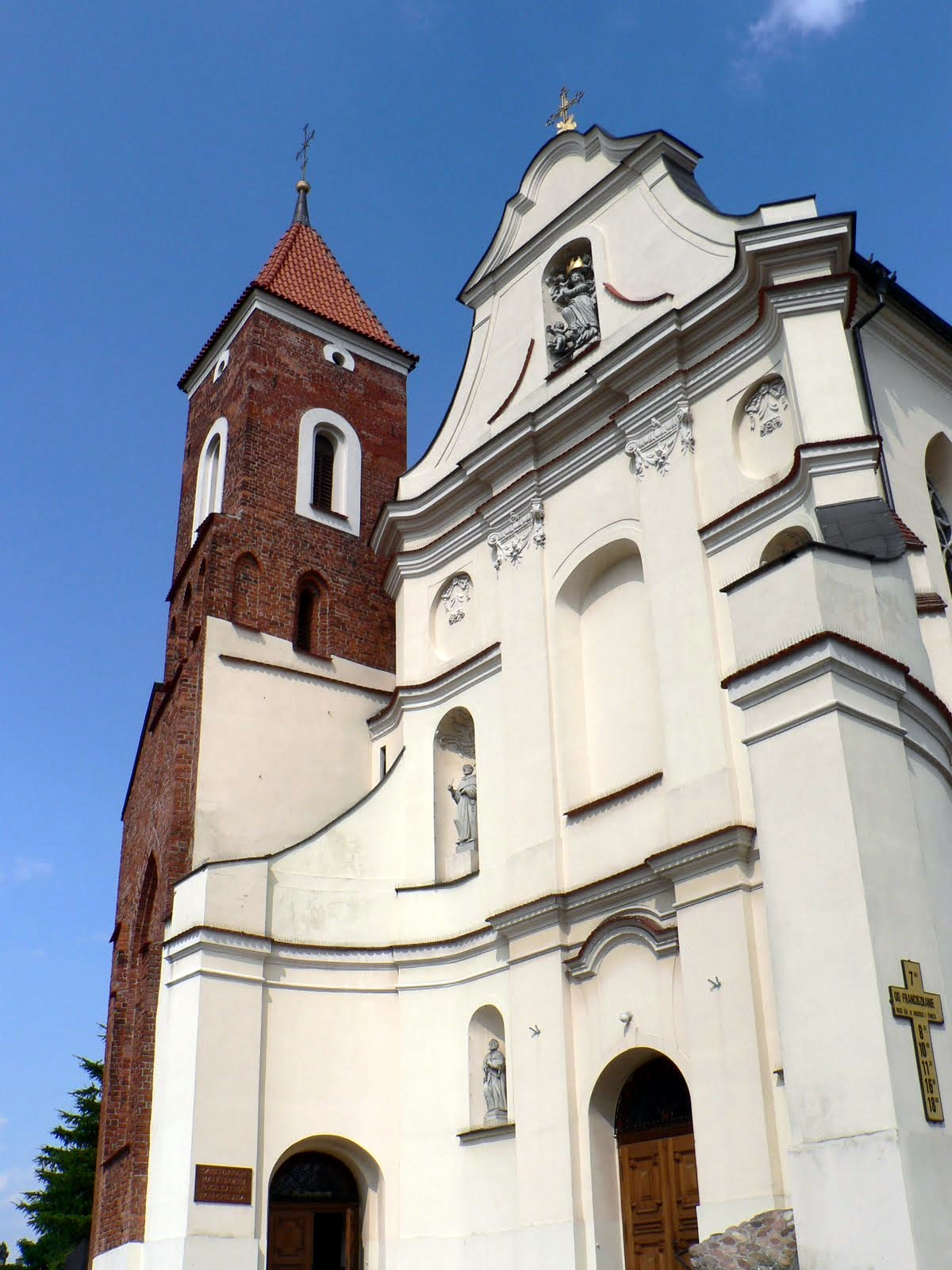 Kościół Franciszkanów w Gnieźnie